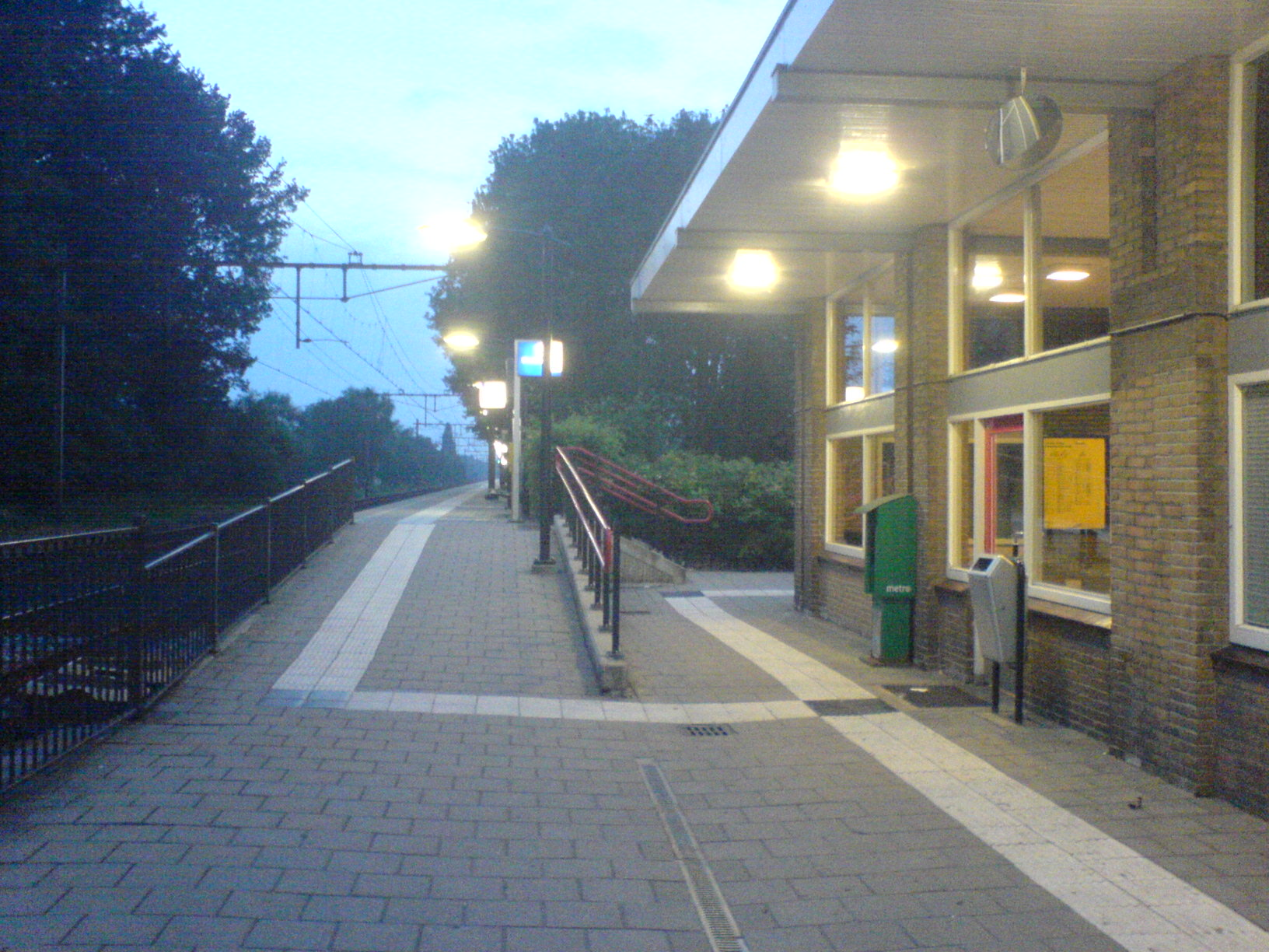 Station Veenendaal de Klomp. Zelfgemaakte en vrijgegeven foto.